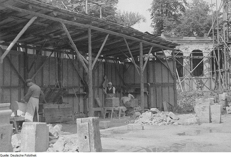 Original image description from the Deutsche Fotothek Steinbildhauerwerkstatt im Zwinger